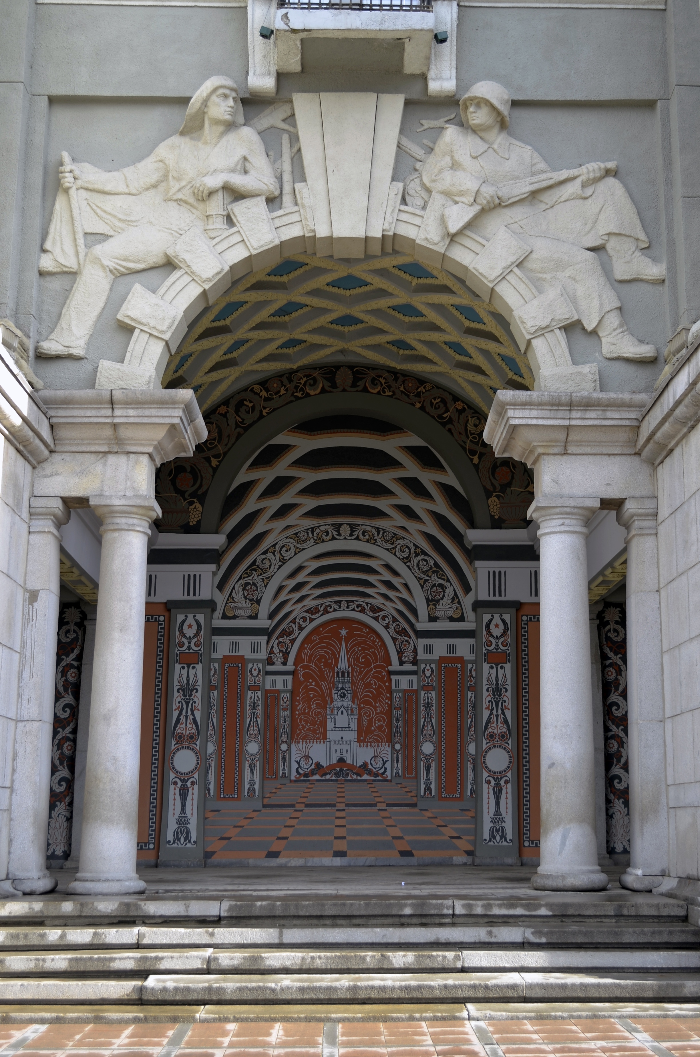 Здание Горсовета: проспект Ленина, 24-а, Екатеринбург, Свердловская область